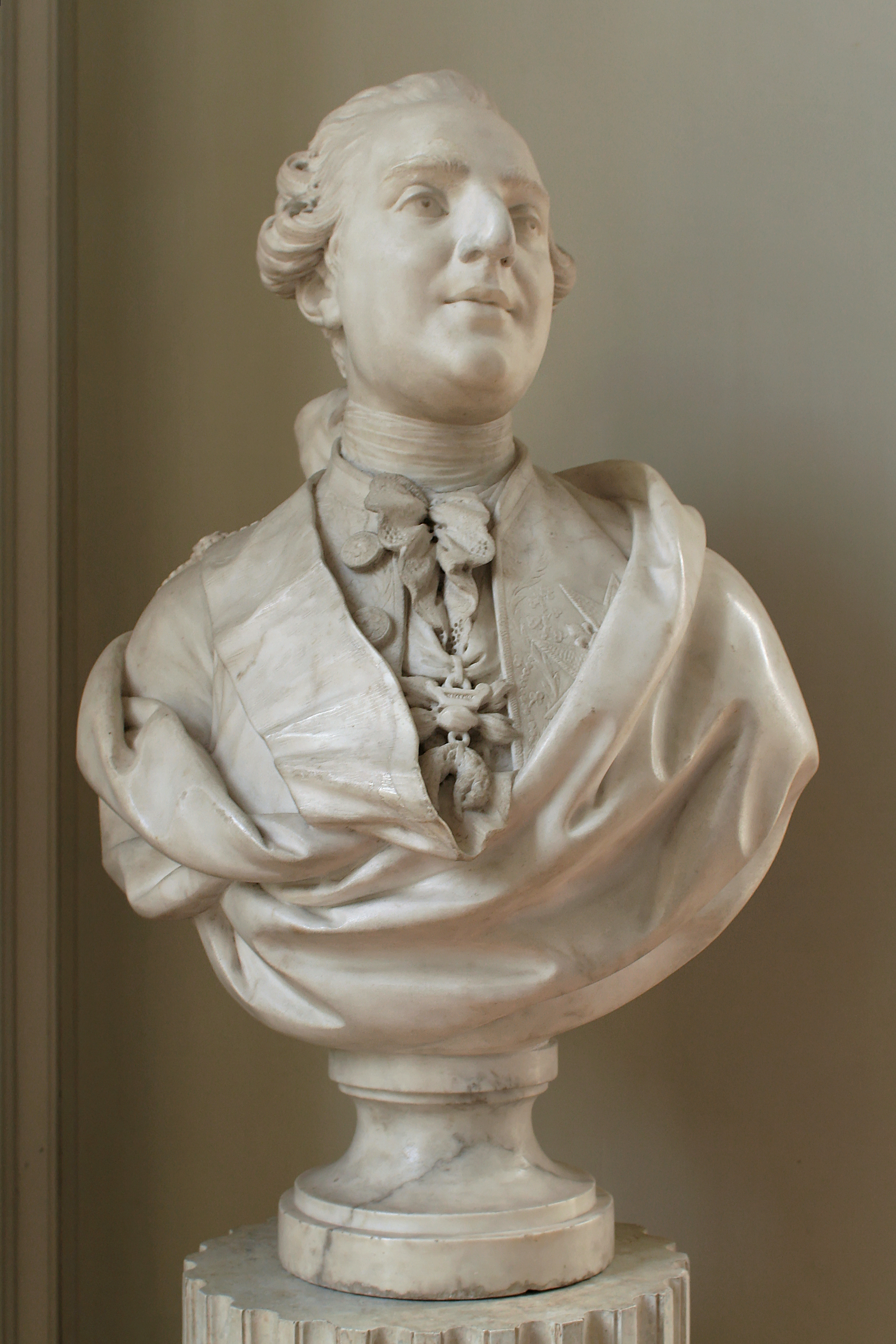 Antichambre du Petit Trianon, buste de Louis XVI, sculpture sur marbre de Louis-Simon Boizot, 1777. Hauteur : 0,78 m. Numéro d'inventaire : MV5789